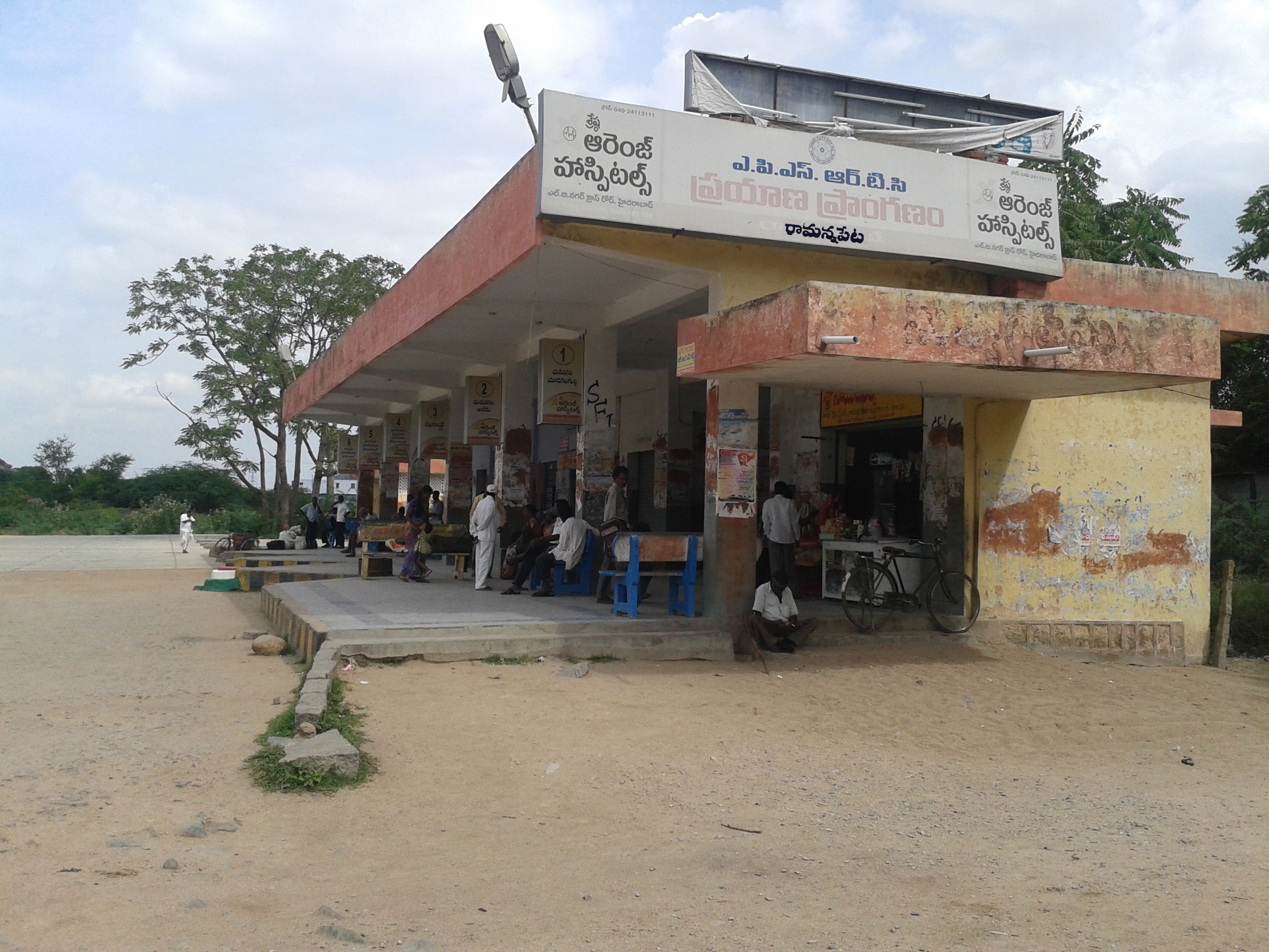 రామన్నపేట బస్టాండు